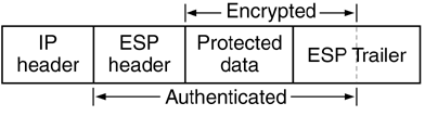 Монгол: frame